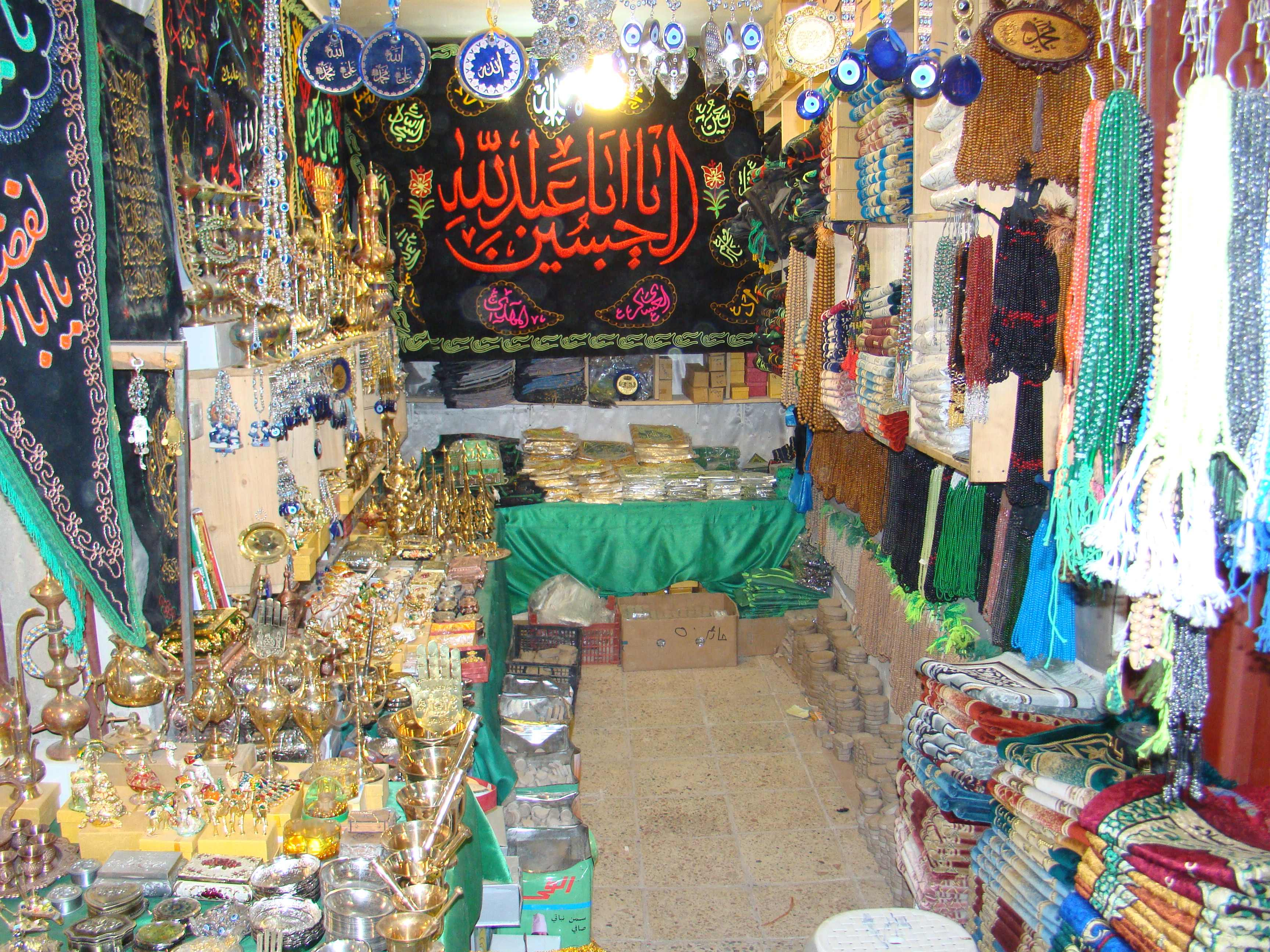 بازار كربلا